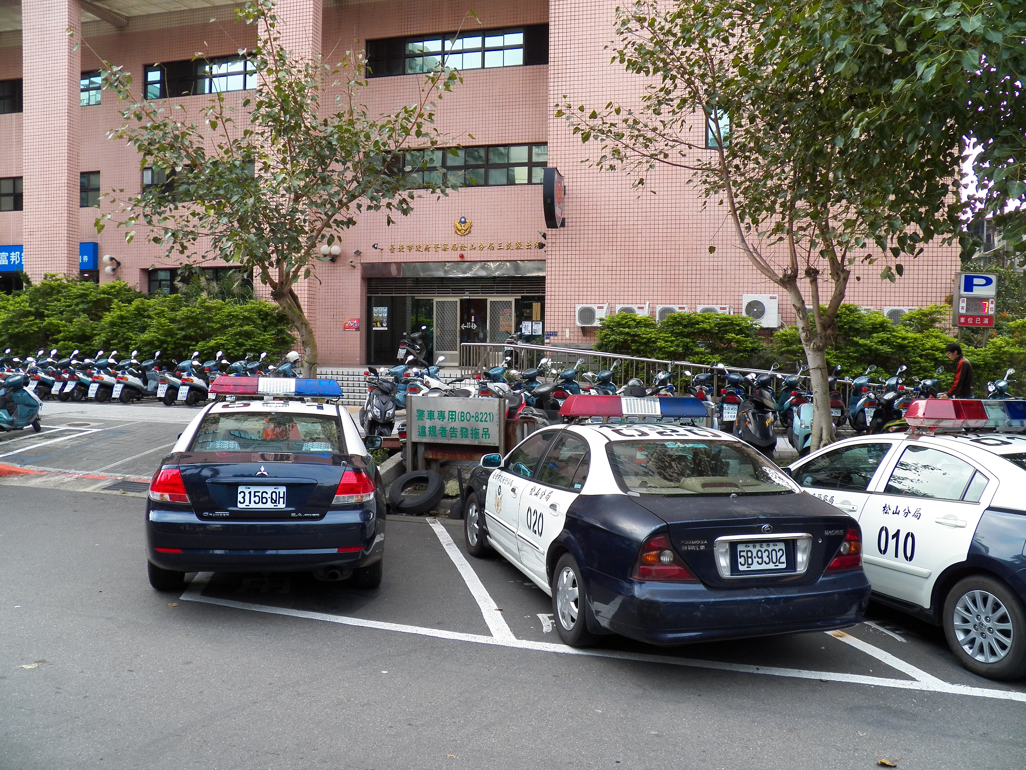 中文（台灣）: 位於臺北市民生社區活動中心1樓，與台北富邦銀行民生分行為鄰的臺北市政府警察局松山分局三民派出所。